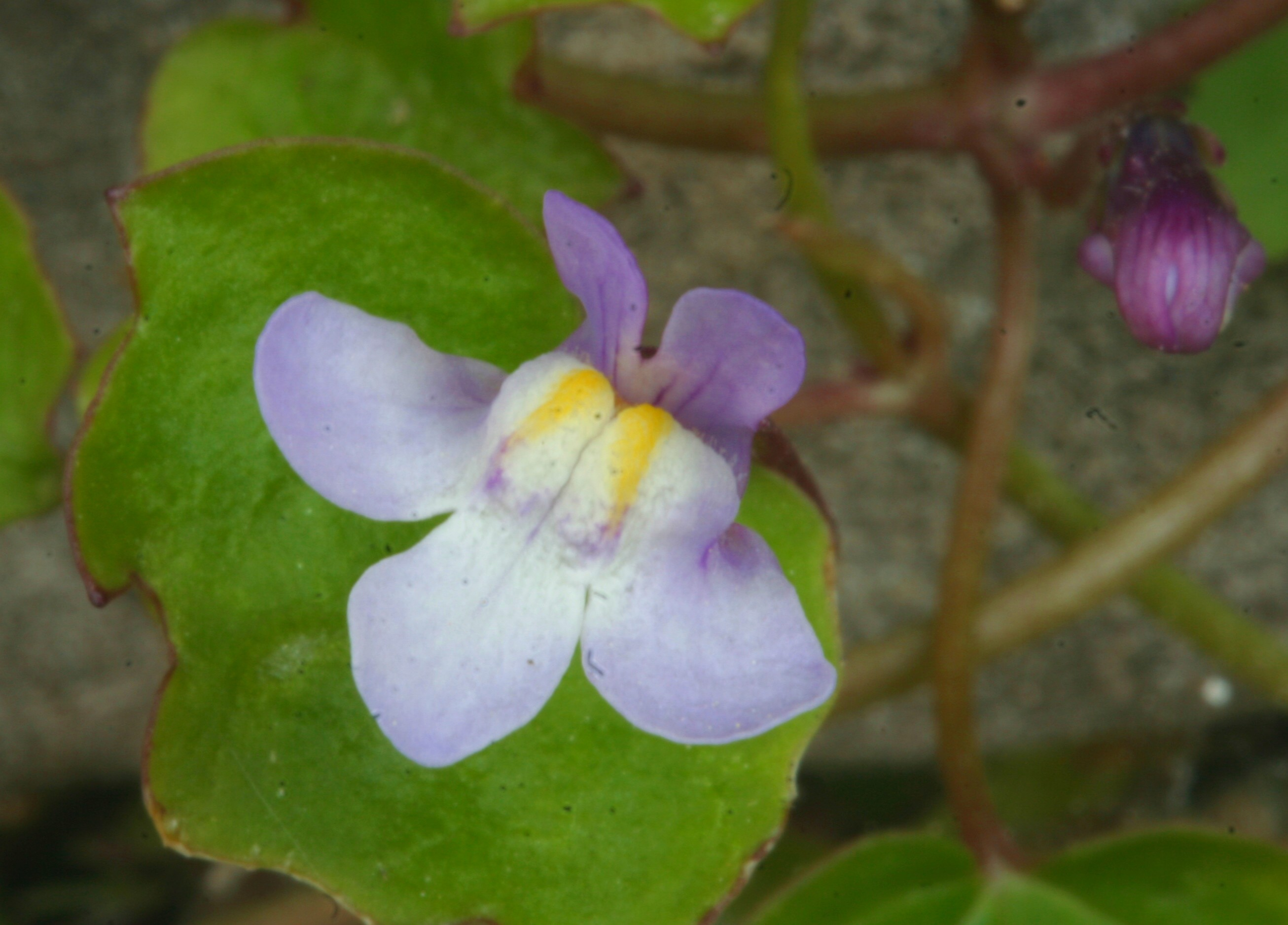 Cymbalaria muralis (Ciombolino comune) Località Cugnach (BL), 488 m s.l.m.